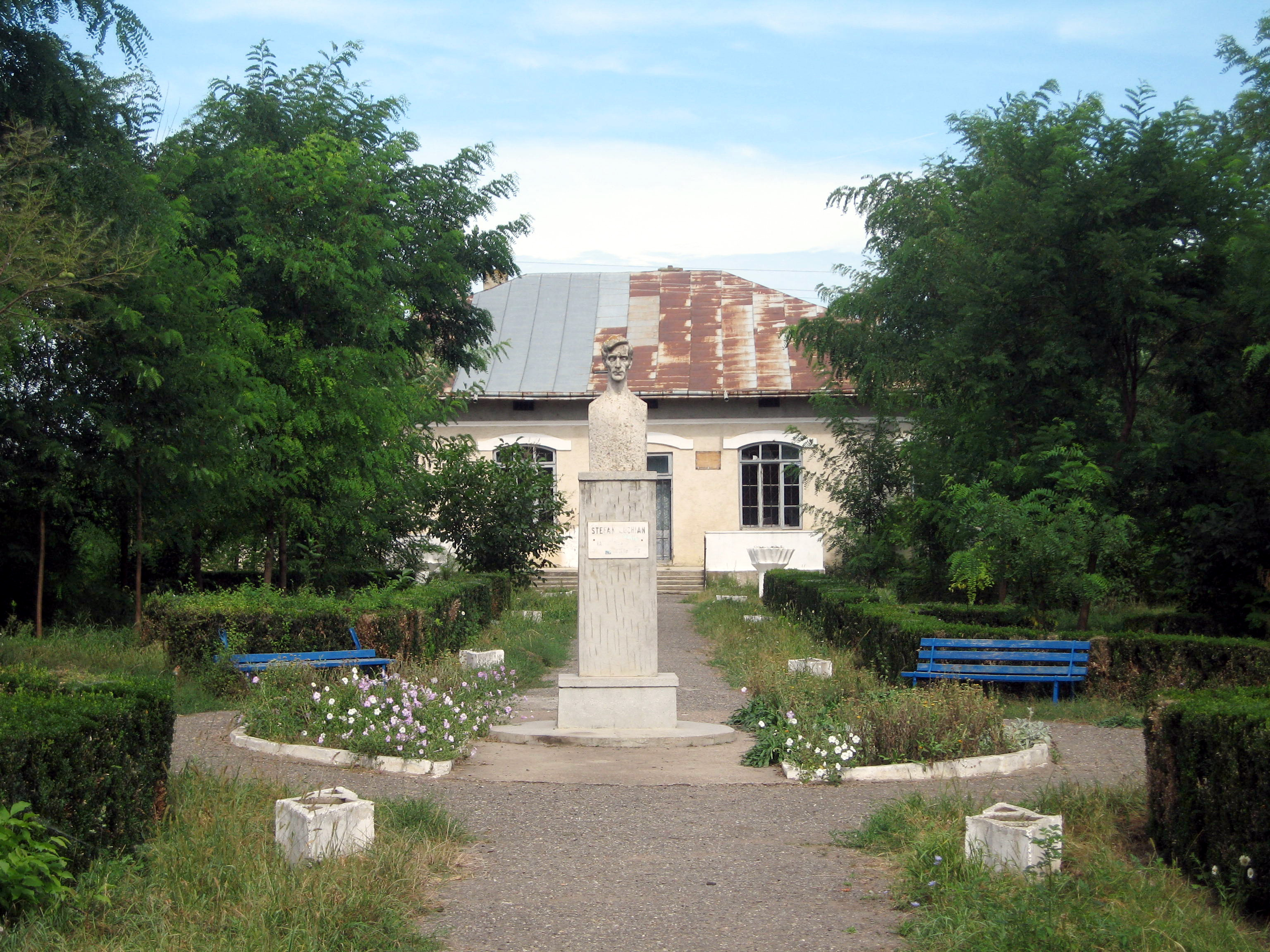 Muzeul Ștefan Luchian din Ștefănești, Botoșani County, Romania